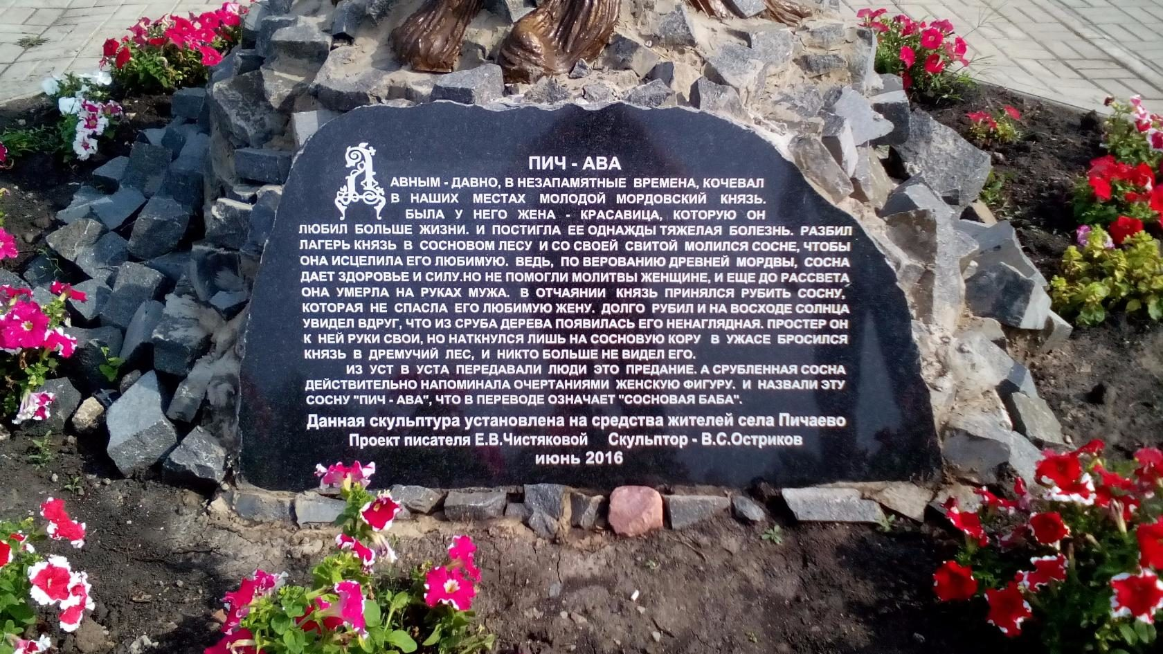 Пичаево